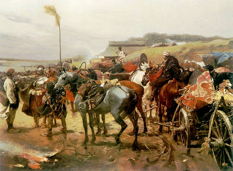 Pospolite ruszenie u brodu. Noble militia at ford.